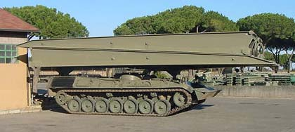 Carro armato leopard in versione gittaponte, esercito italiano